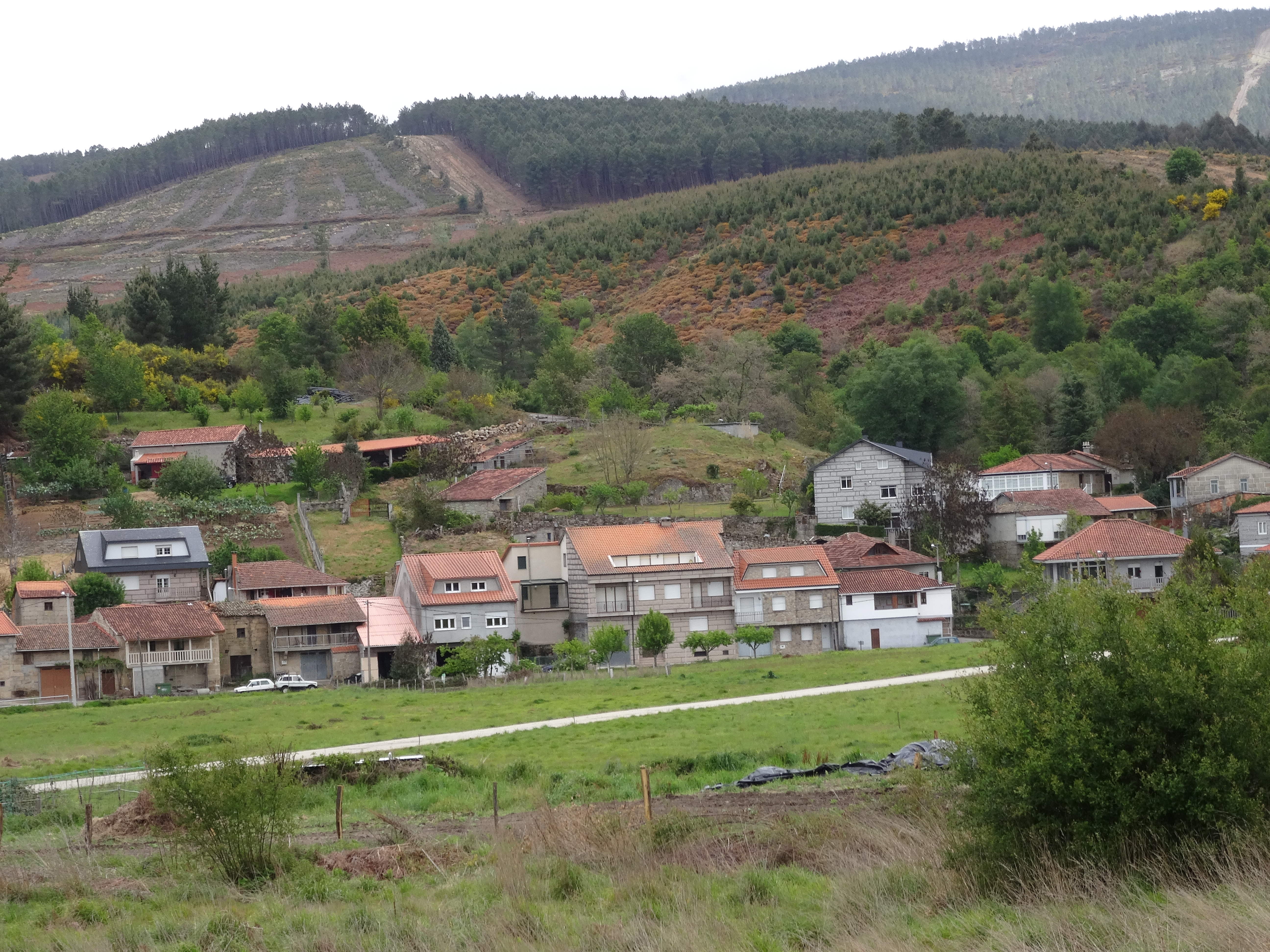 Ver título.